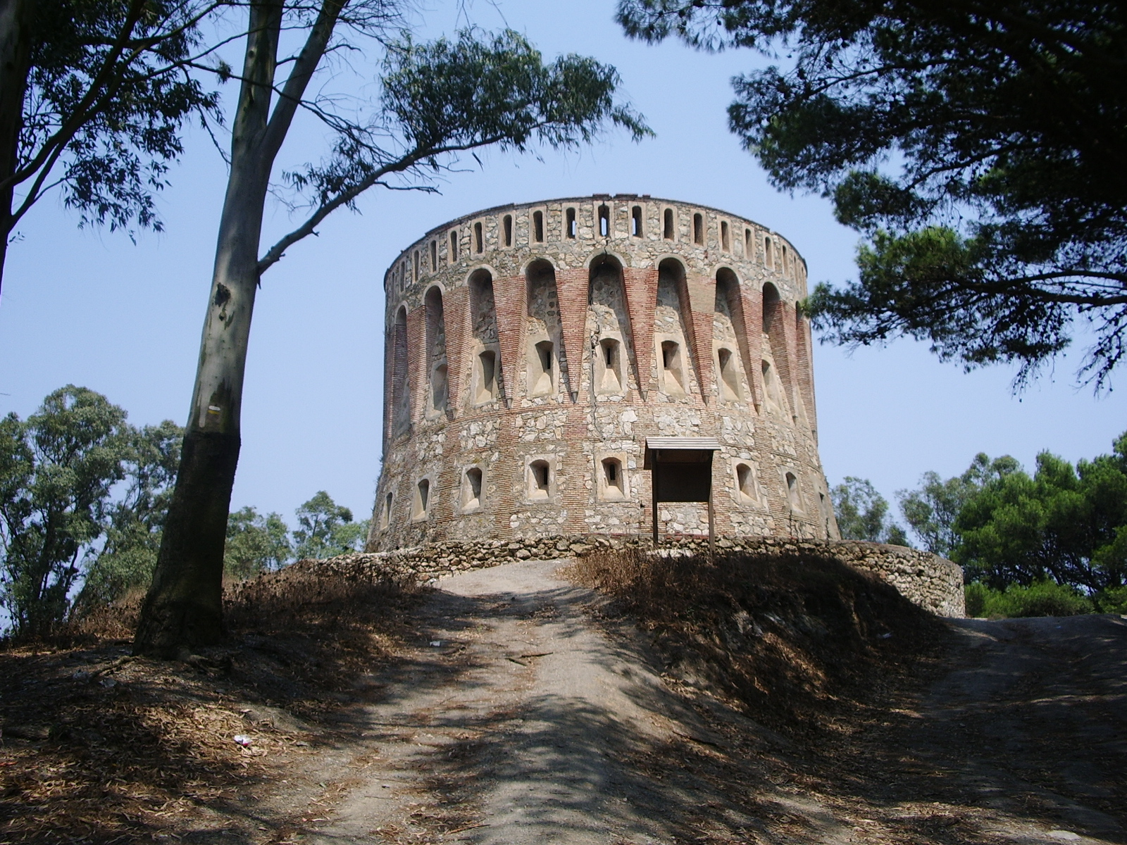 Fort on Ceuta